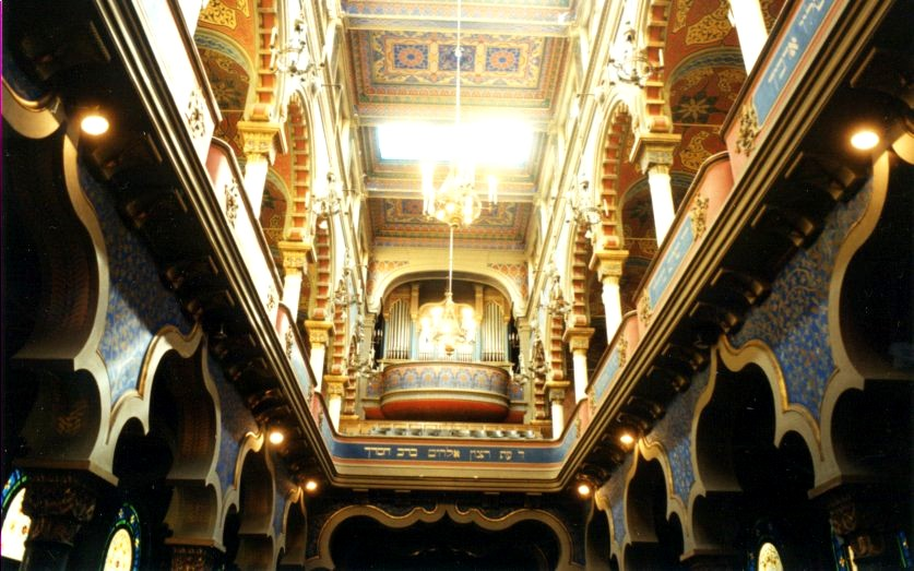 Synagogue du Jubilé de Prague